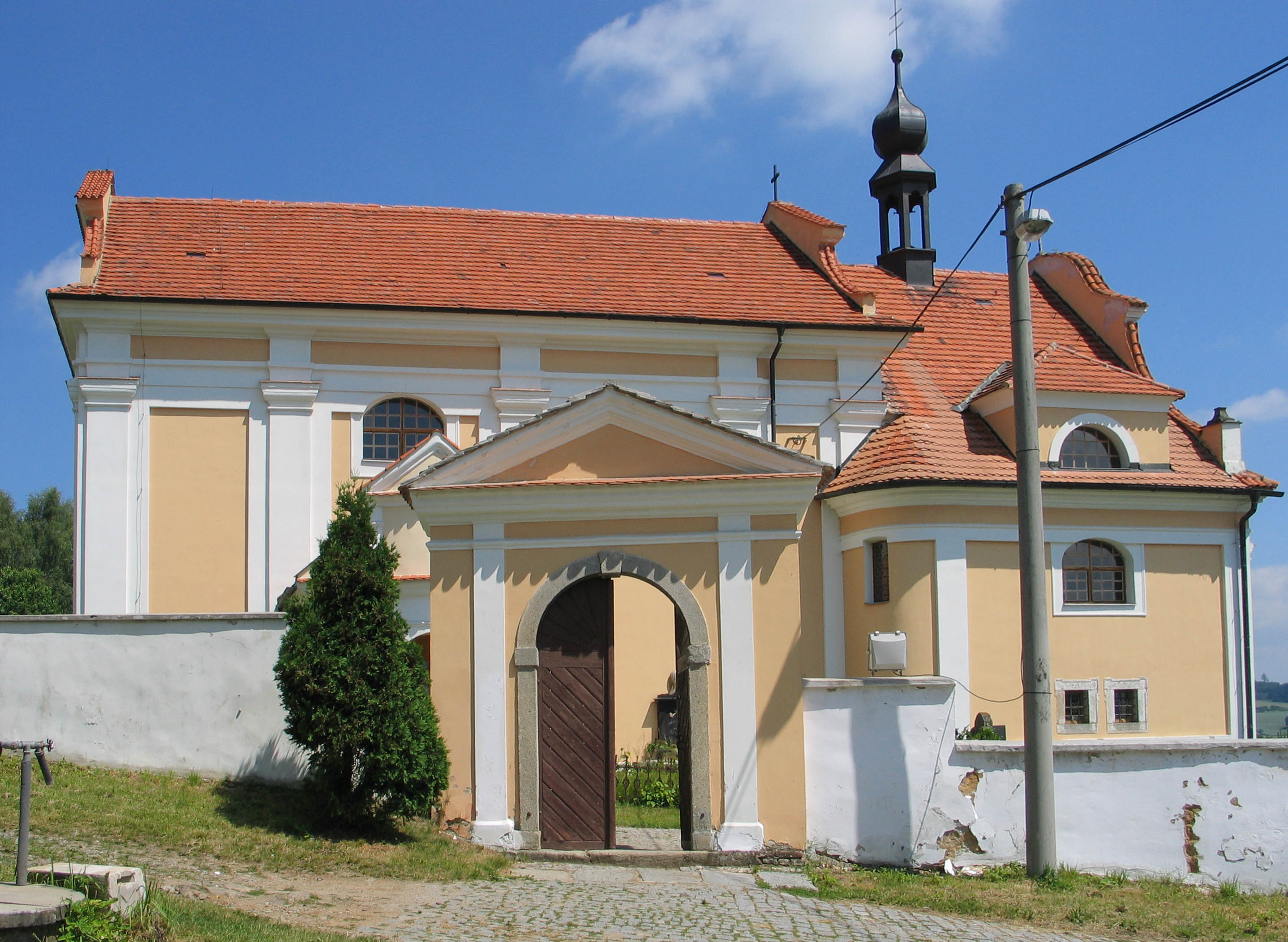 Barokní kostel Nanebevzetí Panny Marie v Kotouni, okres Plzeň-jih